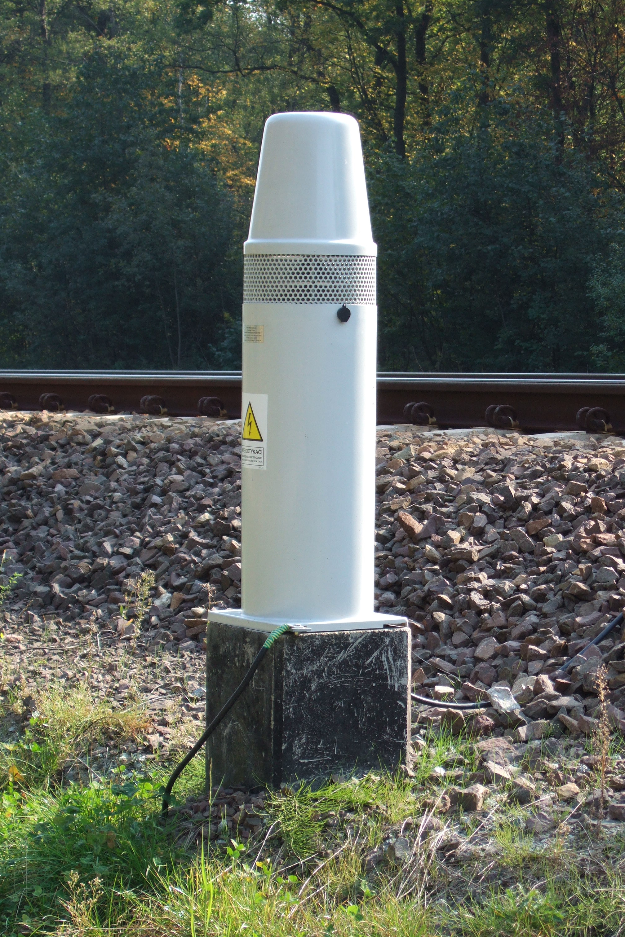 Urządzanie do odstraszania zwierząt UOZ-1 wprowadzane przez PKP